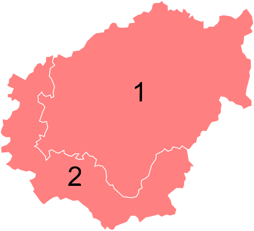 Résultats des élections législatives de la Corrèze en 2012